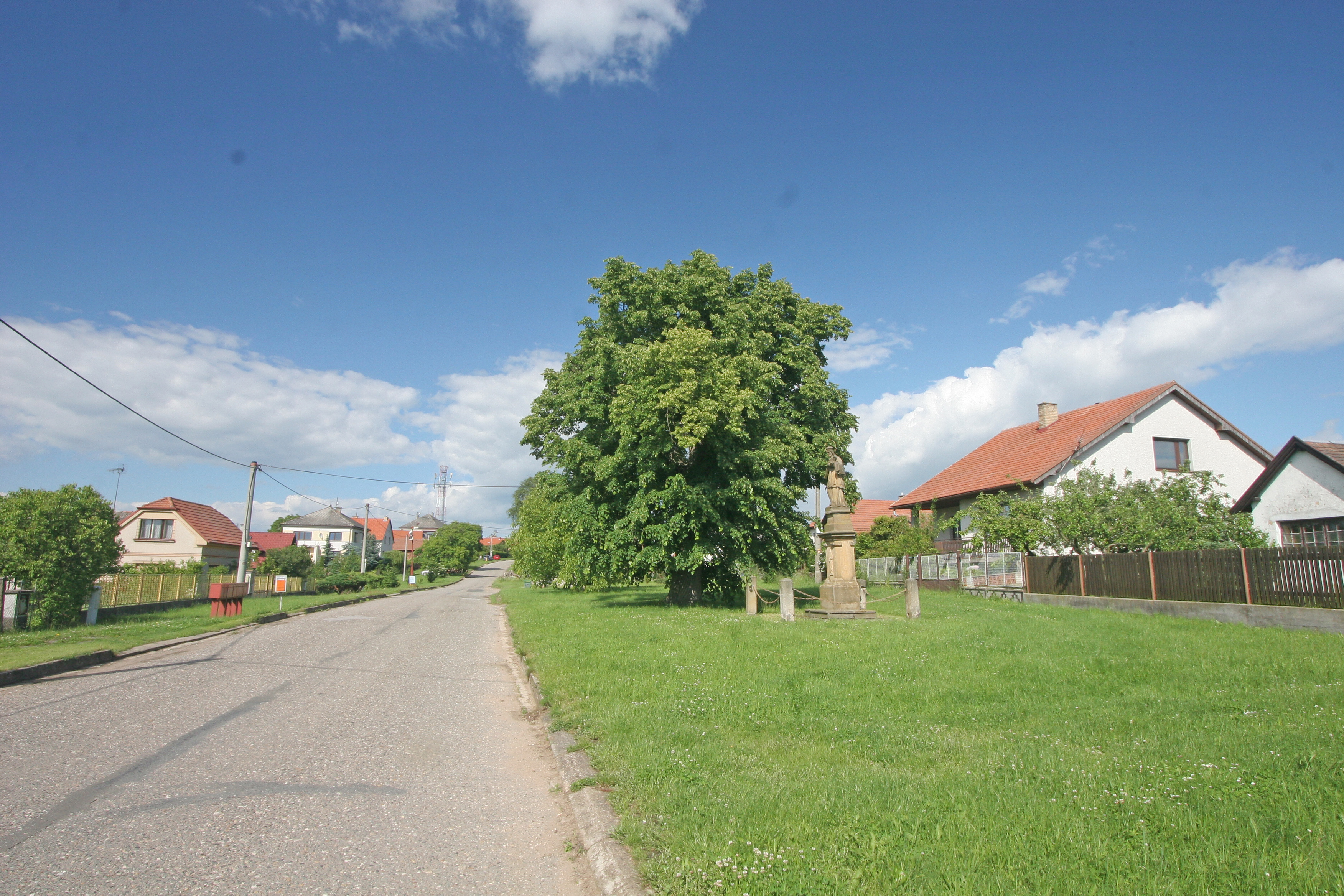 Zdechovice náves